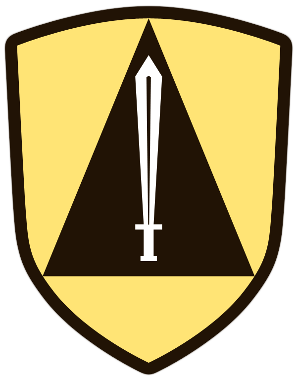 수도방위사령부 로고